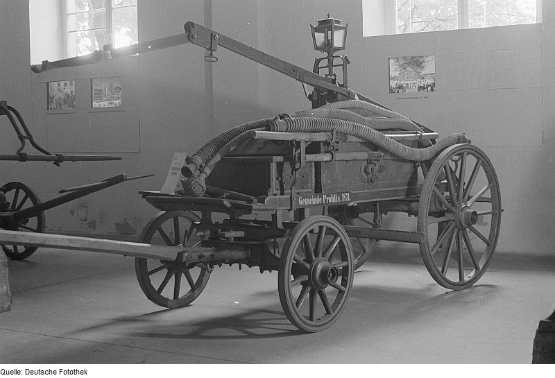 Original image description from the Deutsche Fotothek Löschwagen (Handdruckspritze) der Gemeinde Prohlis, spätes 19. Jahrhundert